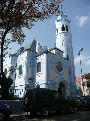 A Kék templom vagy Árpád-házi Szent Erzsébet templom, a Bezruč utcában